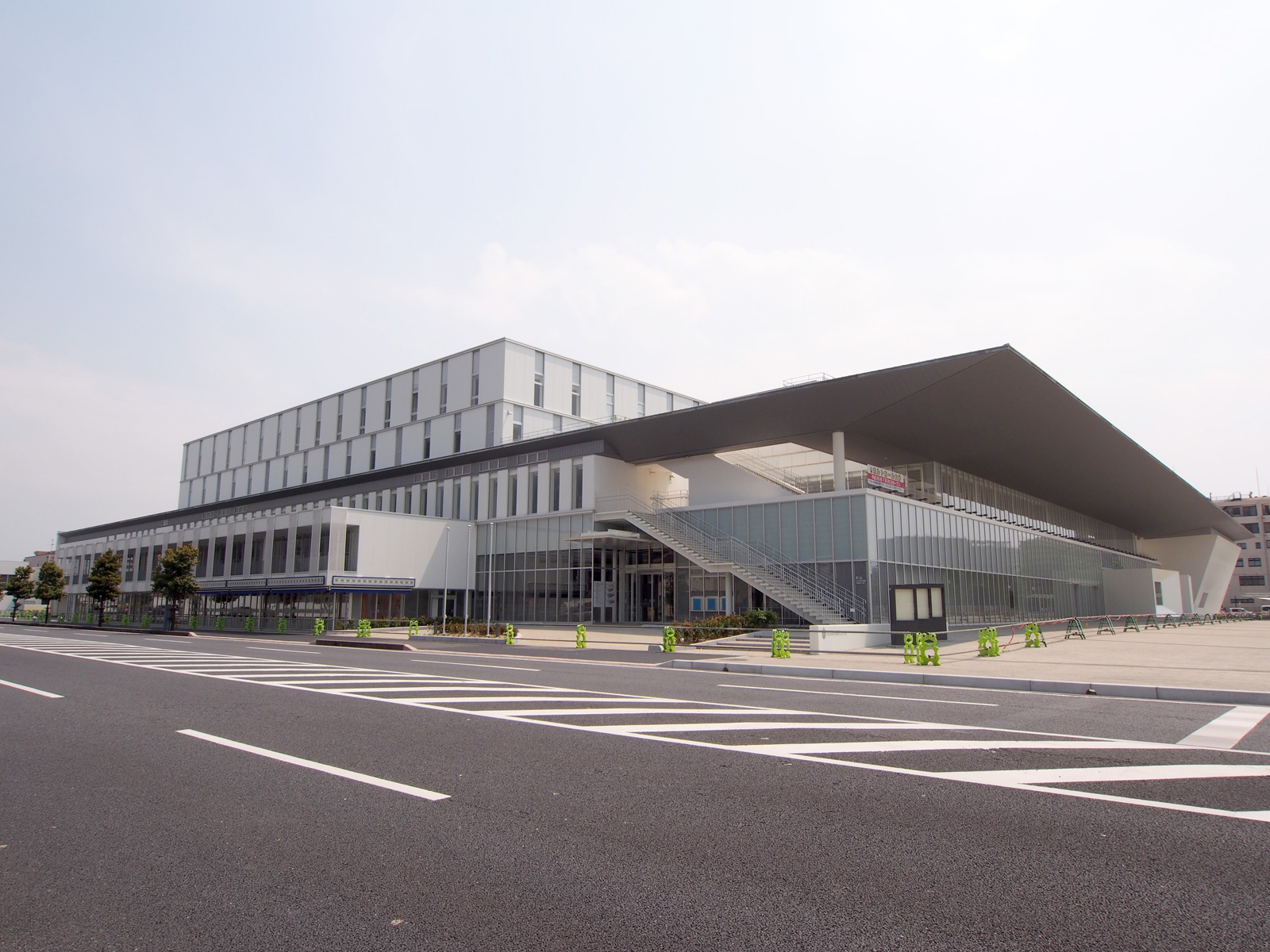 ホルトホール大分（大分県大分市）